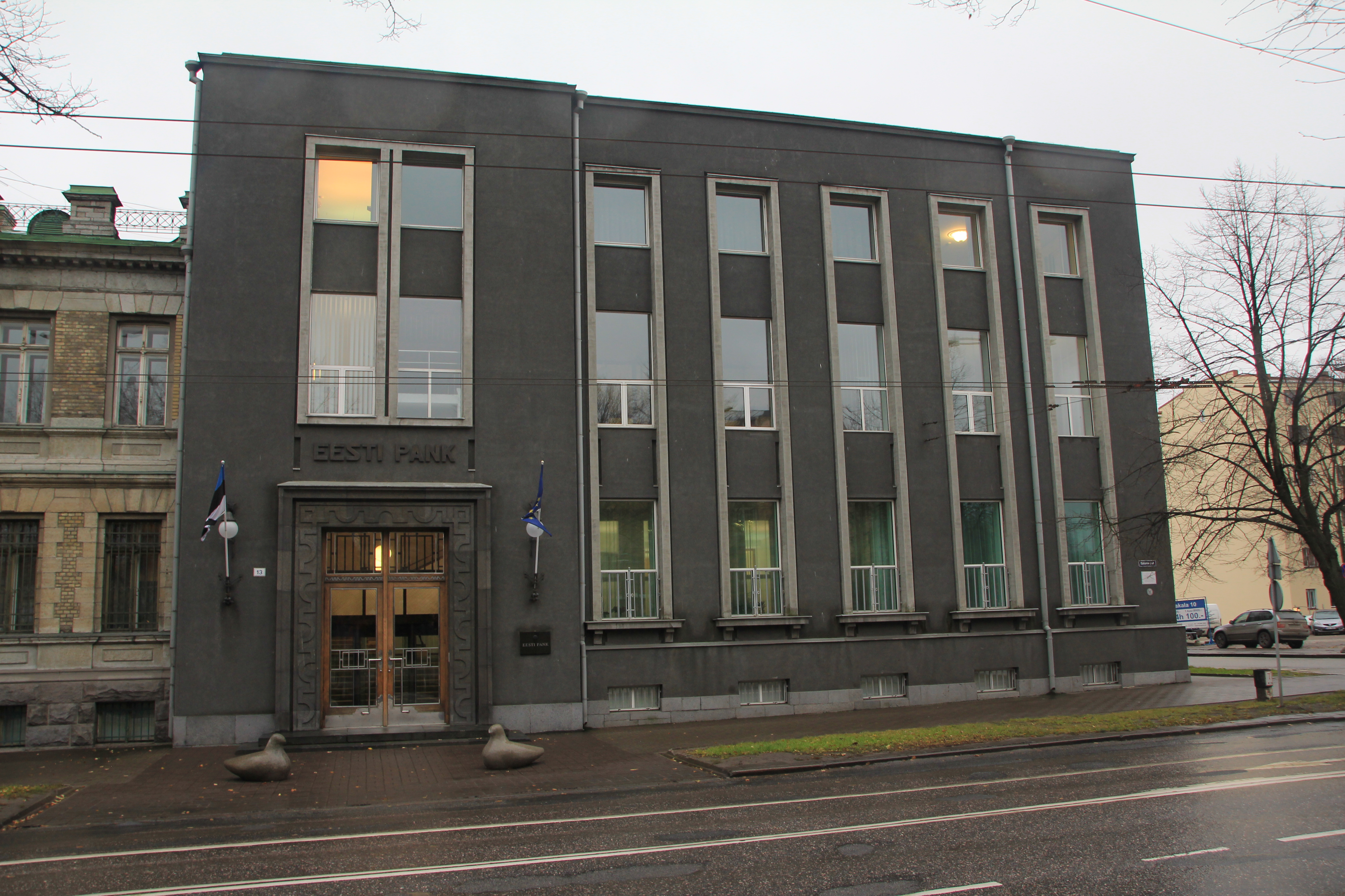 Eesti Panga peahoone Estonia puiestee 13. Arhitektid Eugen Habermann ja Herbert Johanson. Hoone valmis aastal 1935.